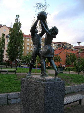 På Nytorget, Stockholm står skulpturen Lek av Bror Hjort, rest 1935 Fotograf : Jordgubbe Juni 2005 Public Domain